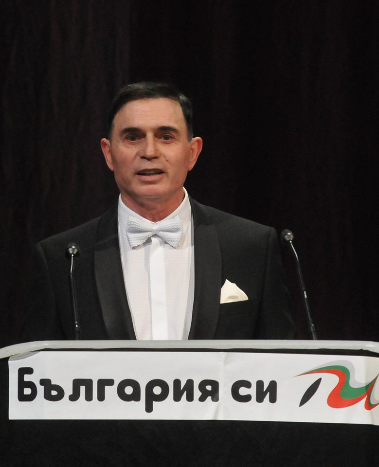 Годишни награди България си ти